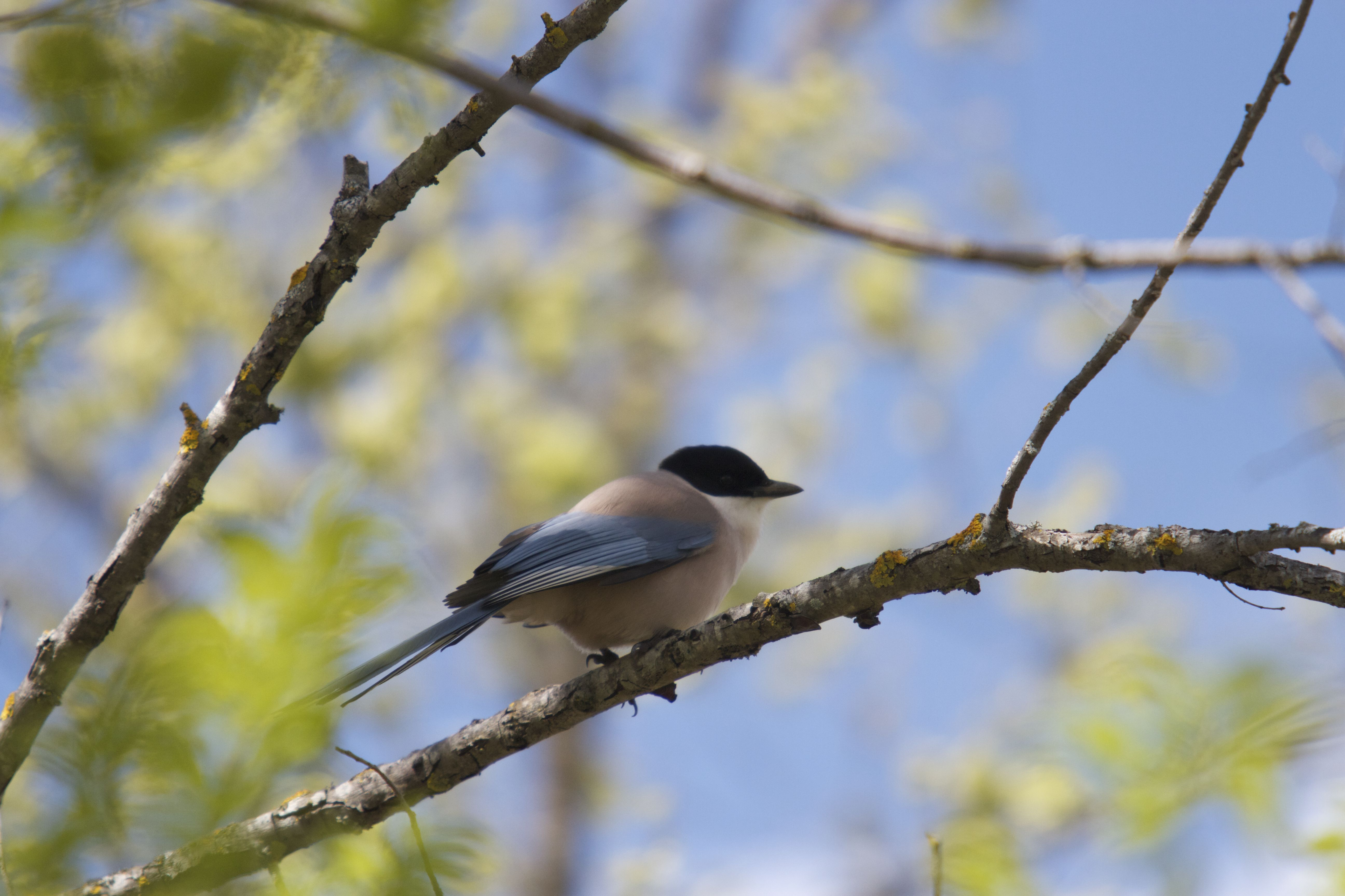 Rabilargo en Monfrague This is a photography of a Special Area of Conservation in Spain with the ID: ES4320077. Natura2000 entry, EEA entry